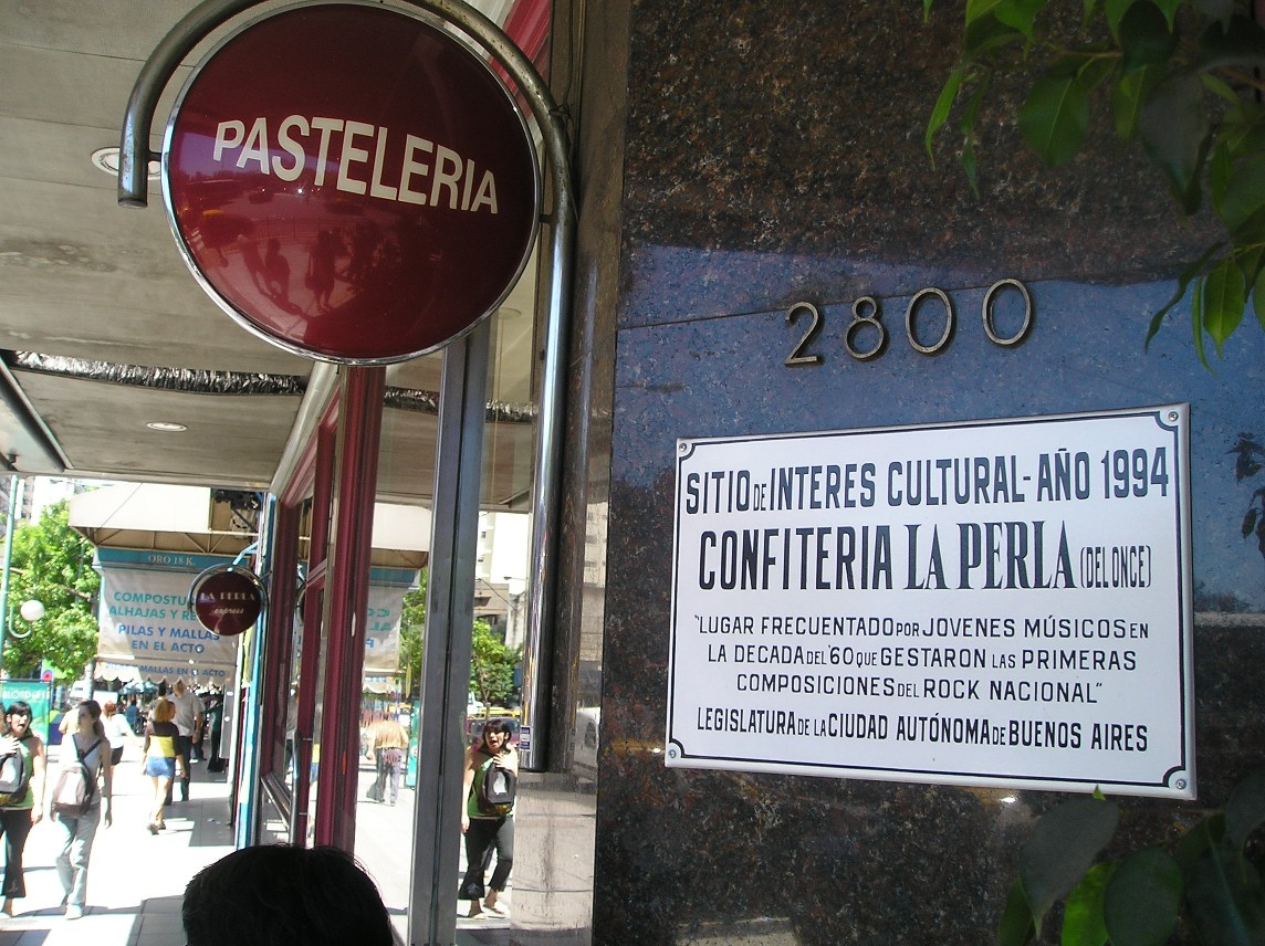 La Perla del Once. Esquina de las avenidas Rivadavia y Jujuy (barrio Once). Buenos Aires. Lugar donde se compuso La Balsa (Litto Nebbia y Tanguito). Placa en la puerta del bar.